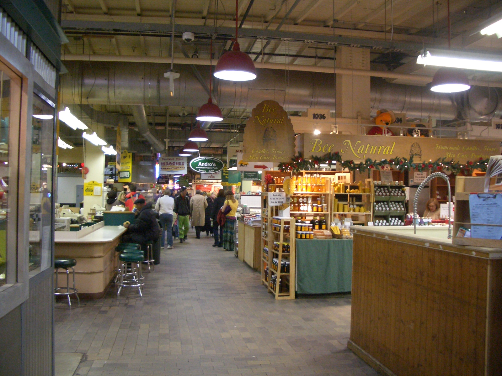 Reading Terminal Market